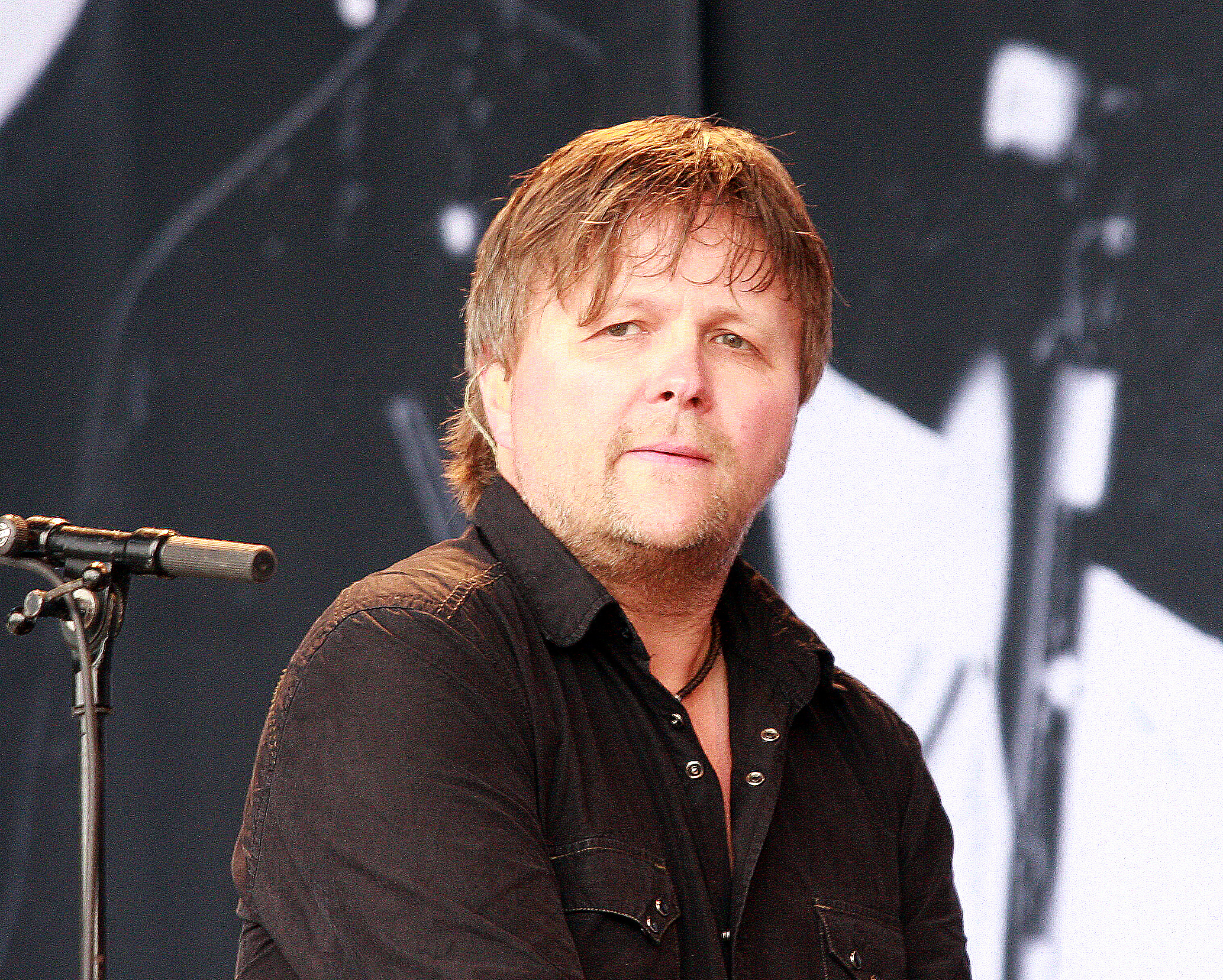 Bård Jørgen Iversen